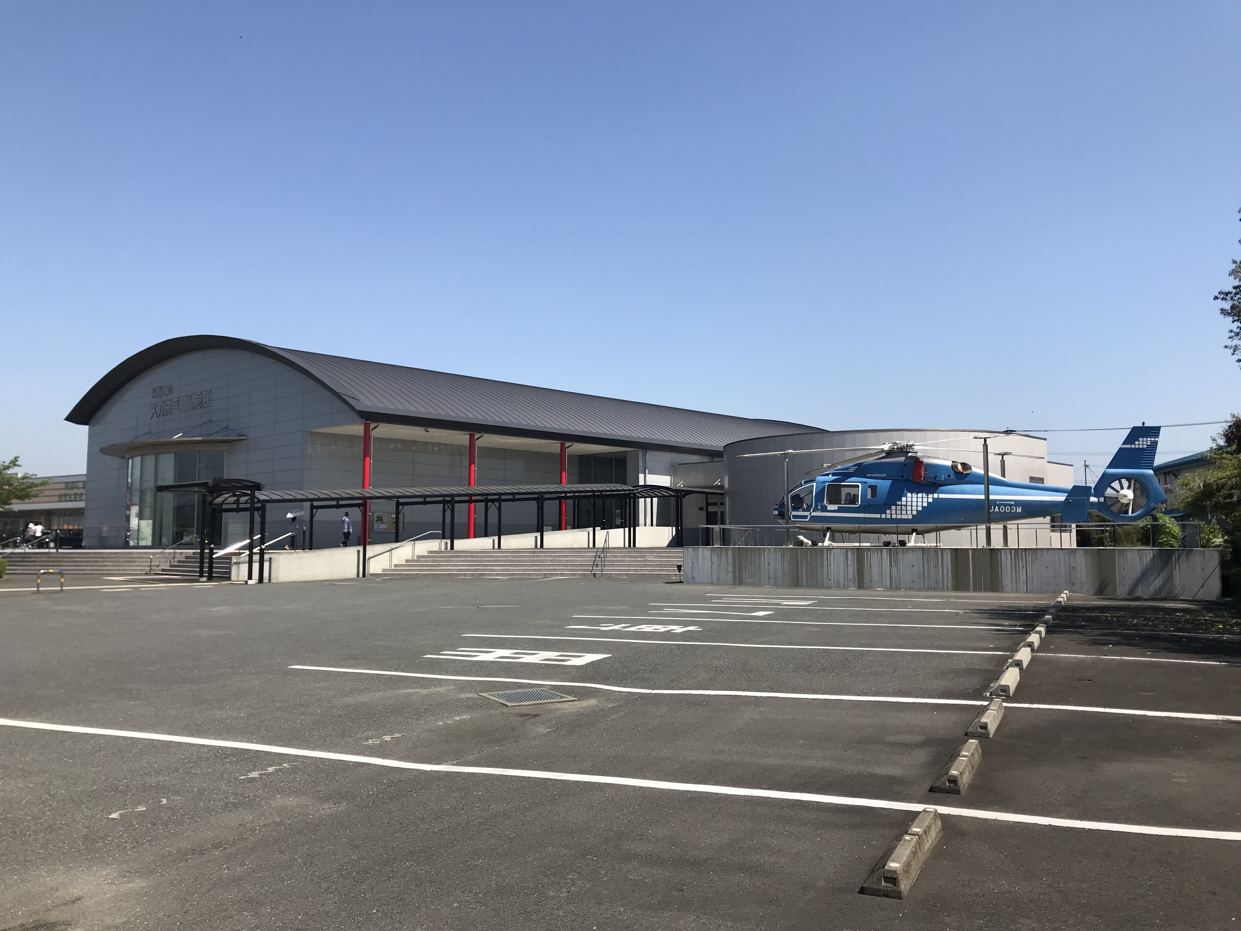 筑前町立大刀洗平和記念館。右側は新館